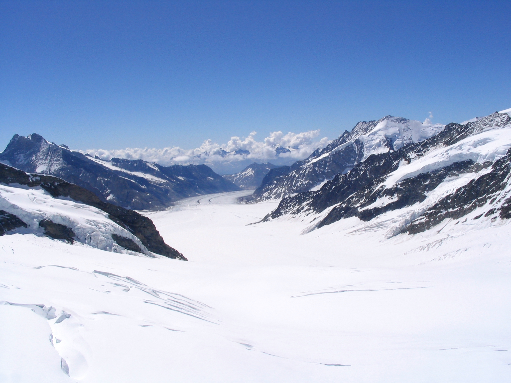 Großer Aletschgletscher (Bernese Alps), view from Jungfraujoch